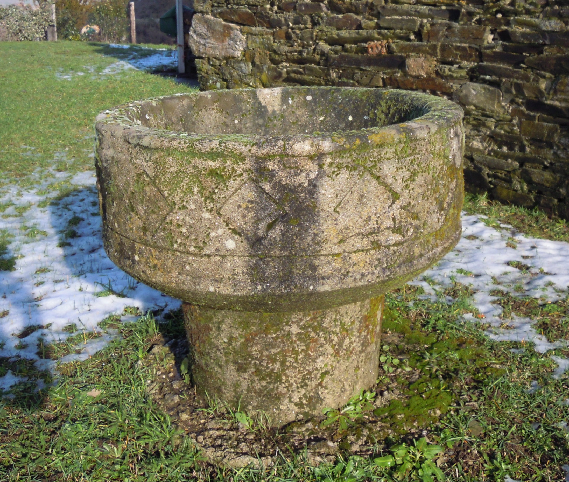 Pía bautismal canda a capela de San Amaro nas Vendas da Barreira (Riós).